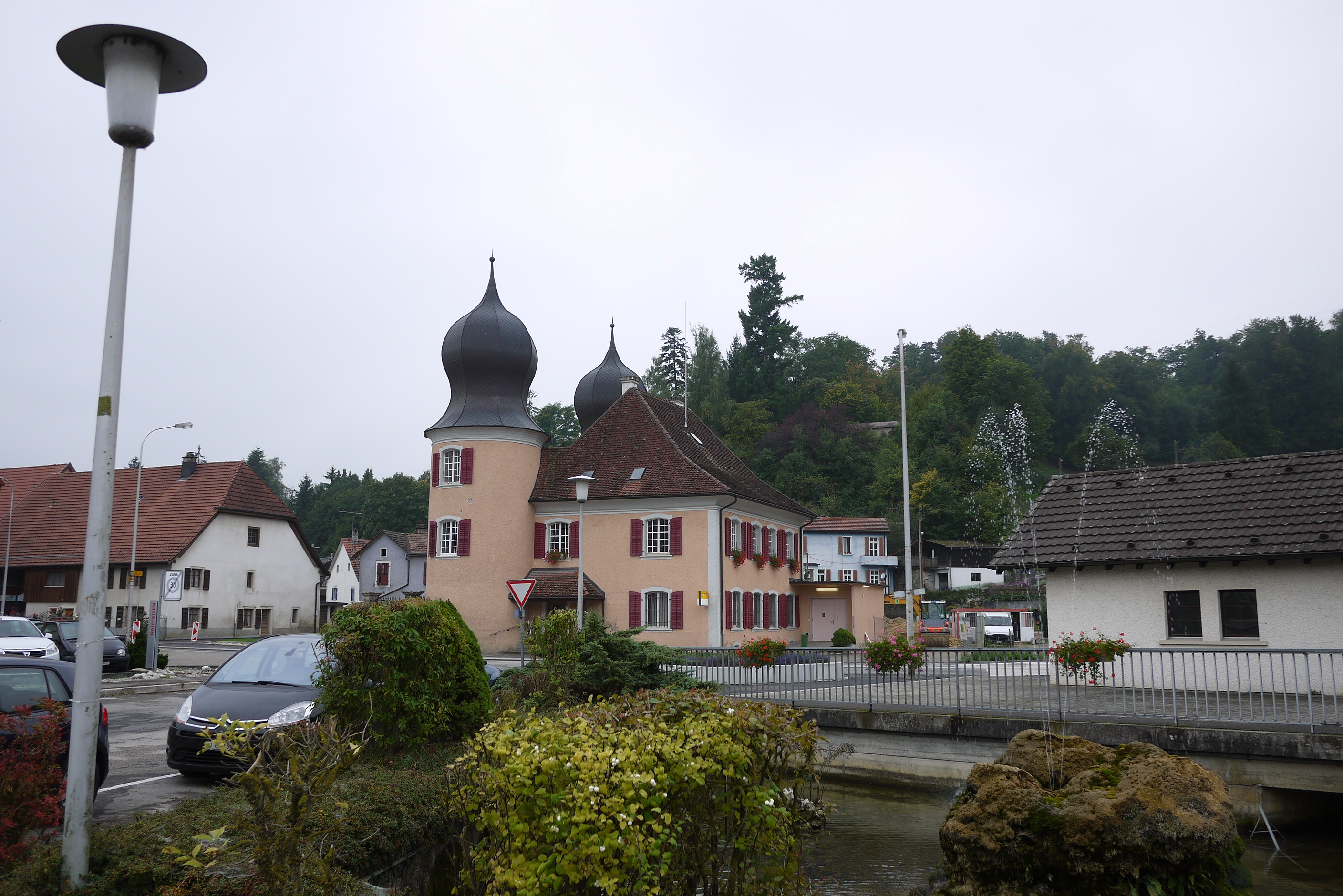 Vue du Château de Fontenais, jadis demeure de Jean-François-Nicolas Faber, médecin du prince-évêque de Bâle.KGS-Nr: 3537